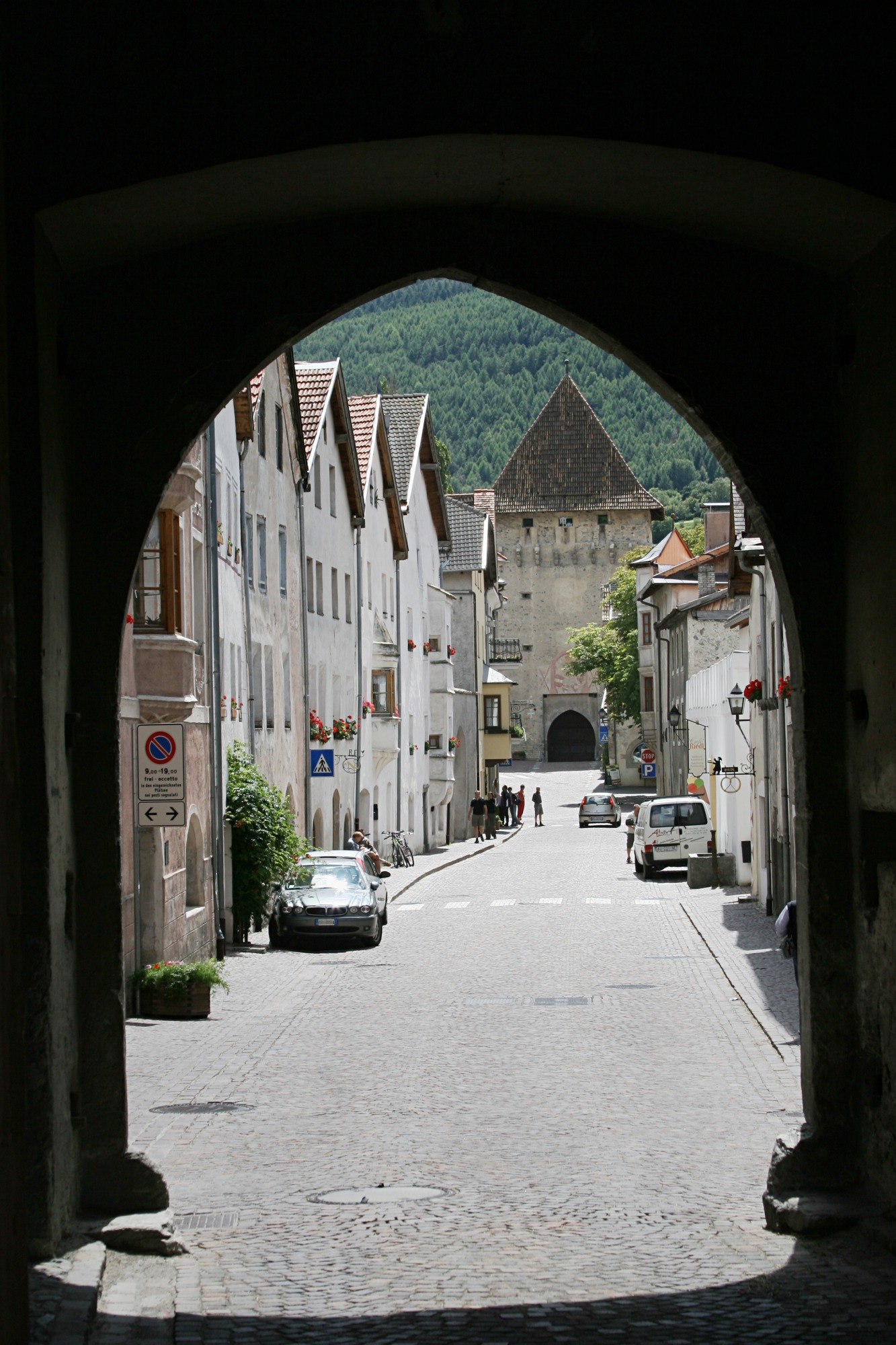 Glurns, view from one city gate to the other - Glurns, Blick von einem Stadttor zum anderen own image, taken August 04, 2005 Photographer: Herbert Ortner, Vienna, Austria